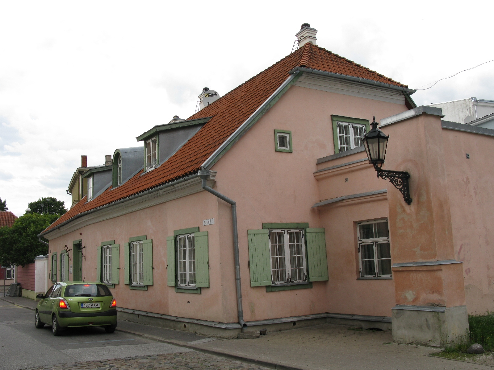 Uppsala maja Tartus Jaani tänaval, vaade Jaani kiriku poolt.